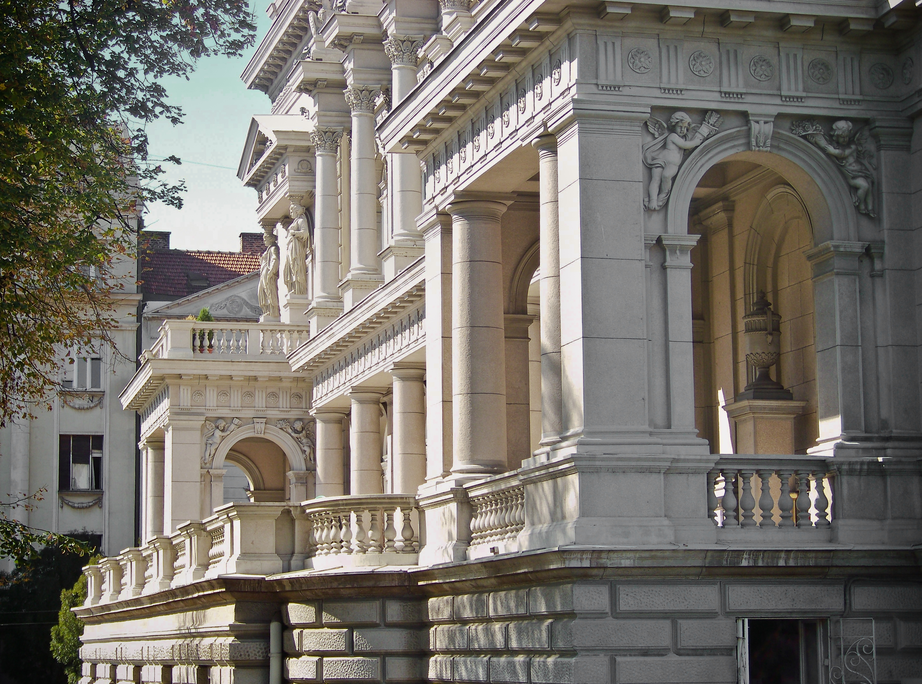 Детаљ са зграде Старог двора, Београд